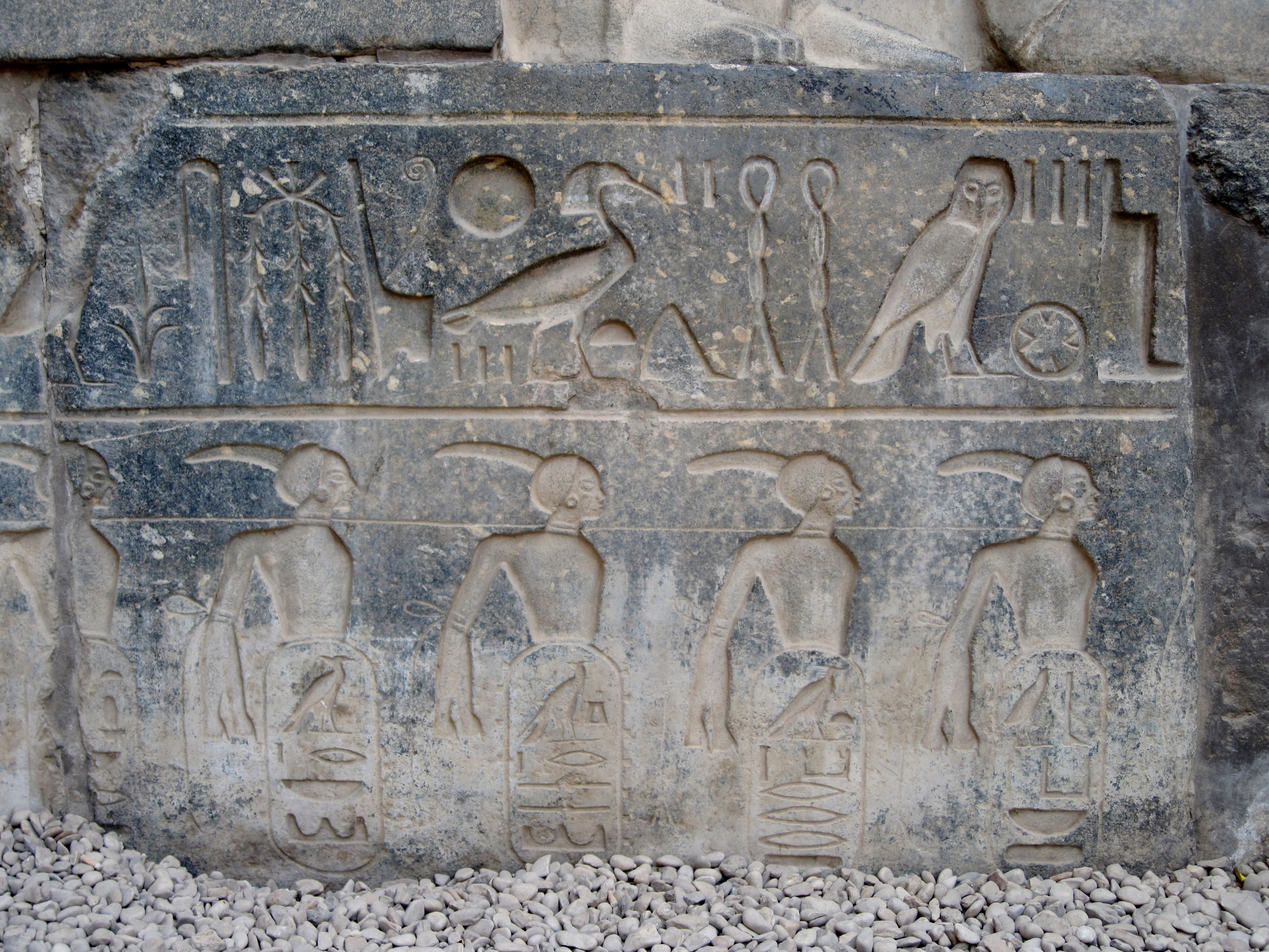 Gefesselte Nubier auf einem Relief am Eingangsbereich des Tempels von Luxor, Ägypten